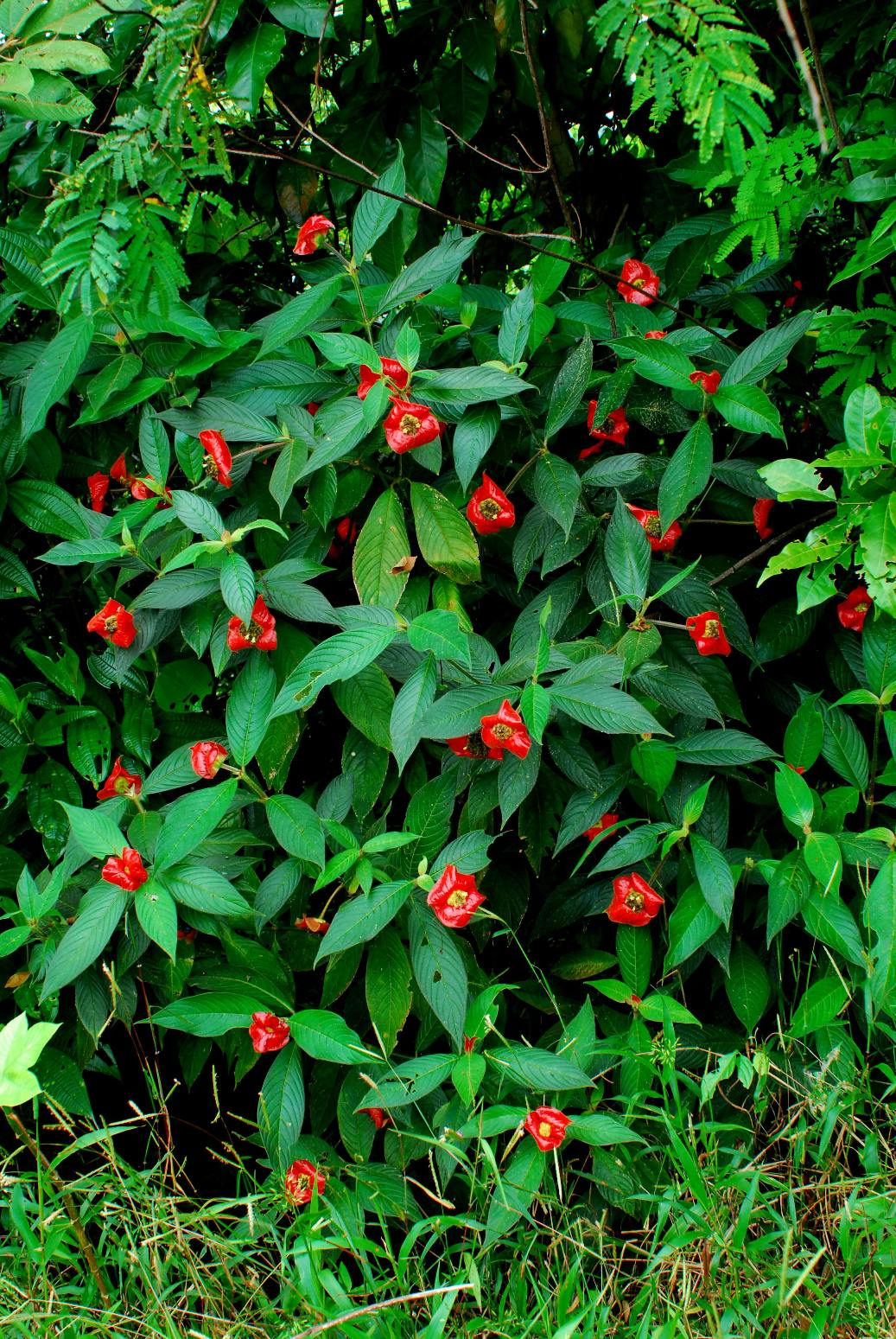 Psychotria poeppigiana near Dominical, Costa Rica.